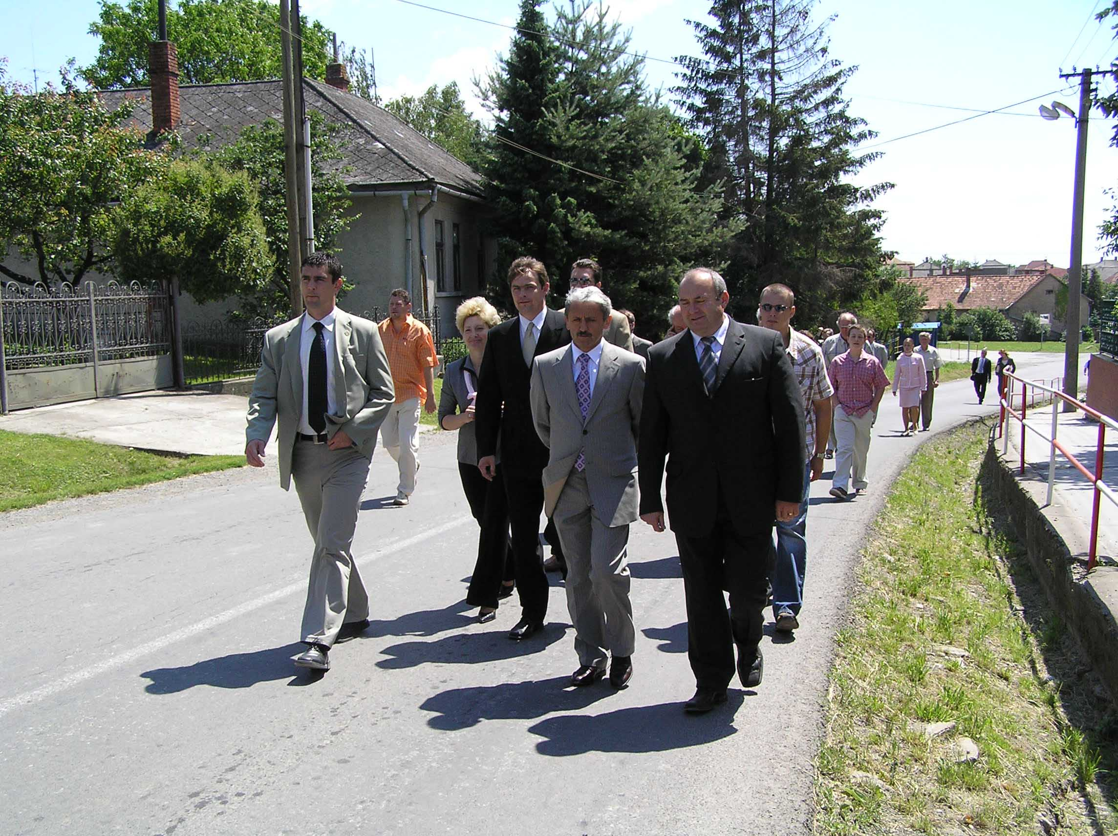 Popis: Mikuláš Dzurinda v Rozhanovciach. Autor: Vladimir Supik - Gioel Dátum: 11. 7. 2006 Licencia: PD Kategória:Presunúť_na_Commons